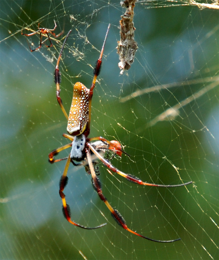 Nephila clavipes female and male